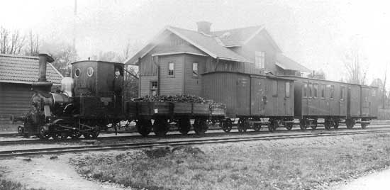 Bahnhofsgebäude in Askersund mit der Lok Nr. 1 'Karberg'